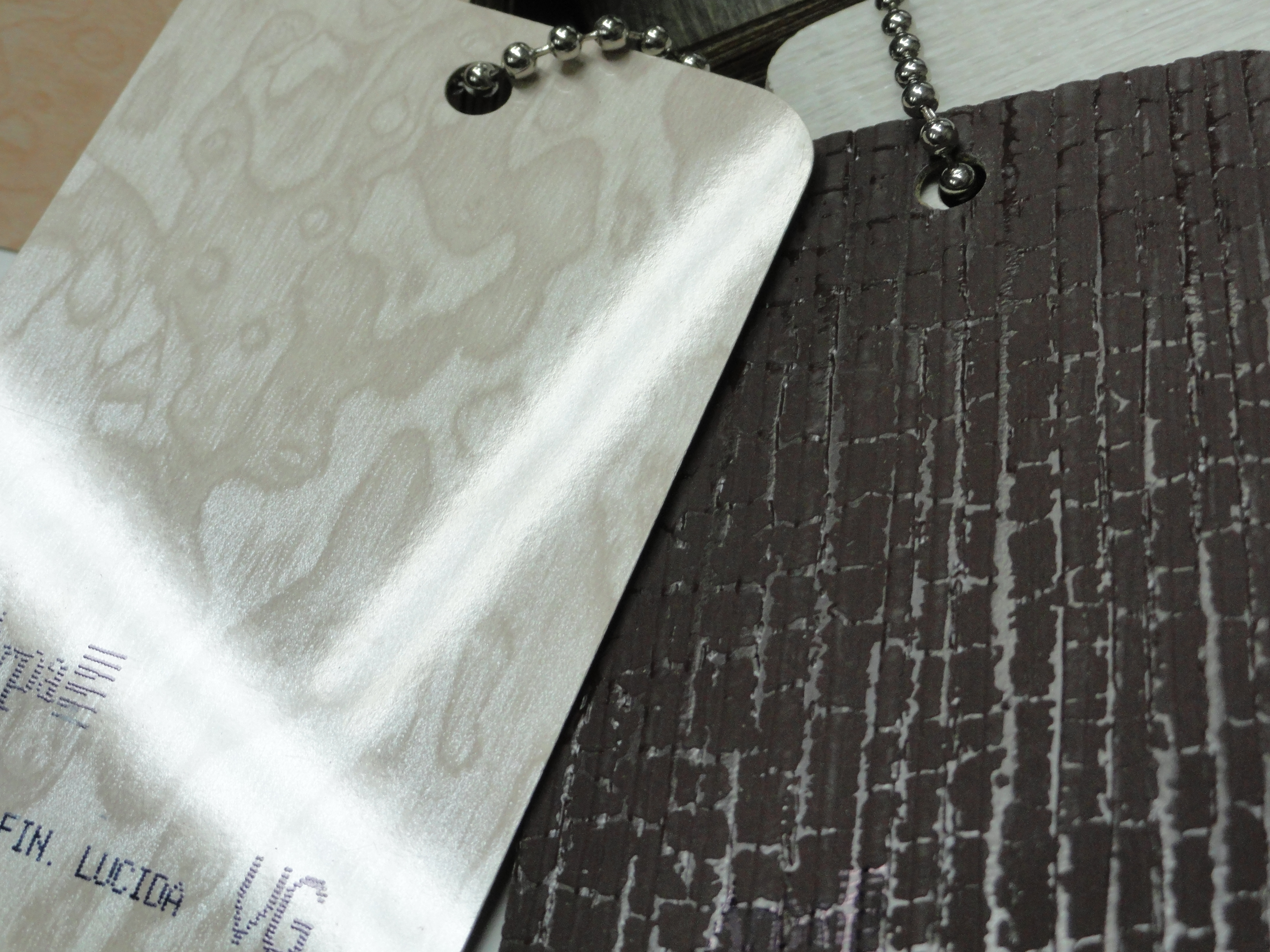 Декоративный бумажно-слоистый пластик ДБСП Decorative HPLaminate